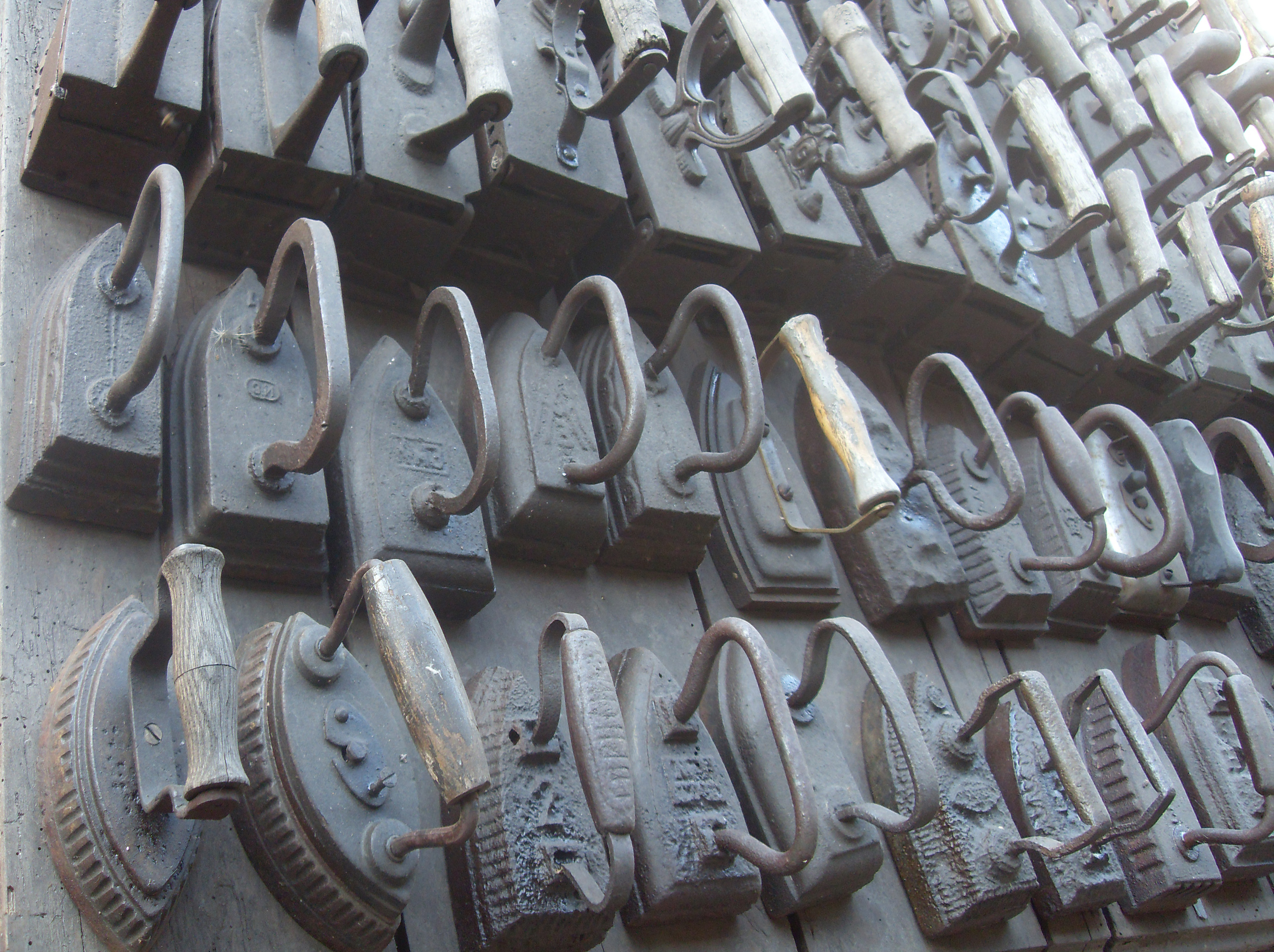 Київський музей вторсировини, колекція прасок.